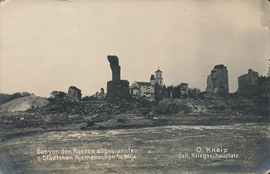 Беларуская (тарашкевіца): Немянчын (Niemiančyn)